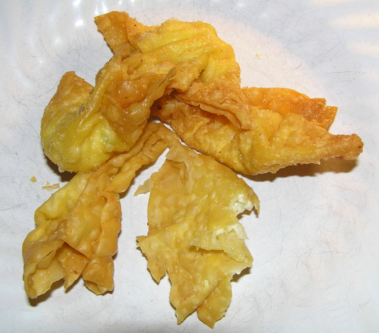 Crab Rangoon